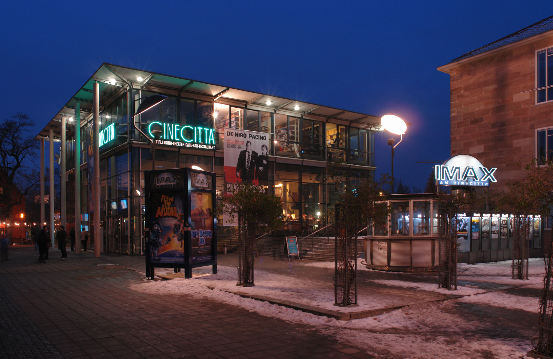 Cinecittà Nürnberg